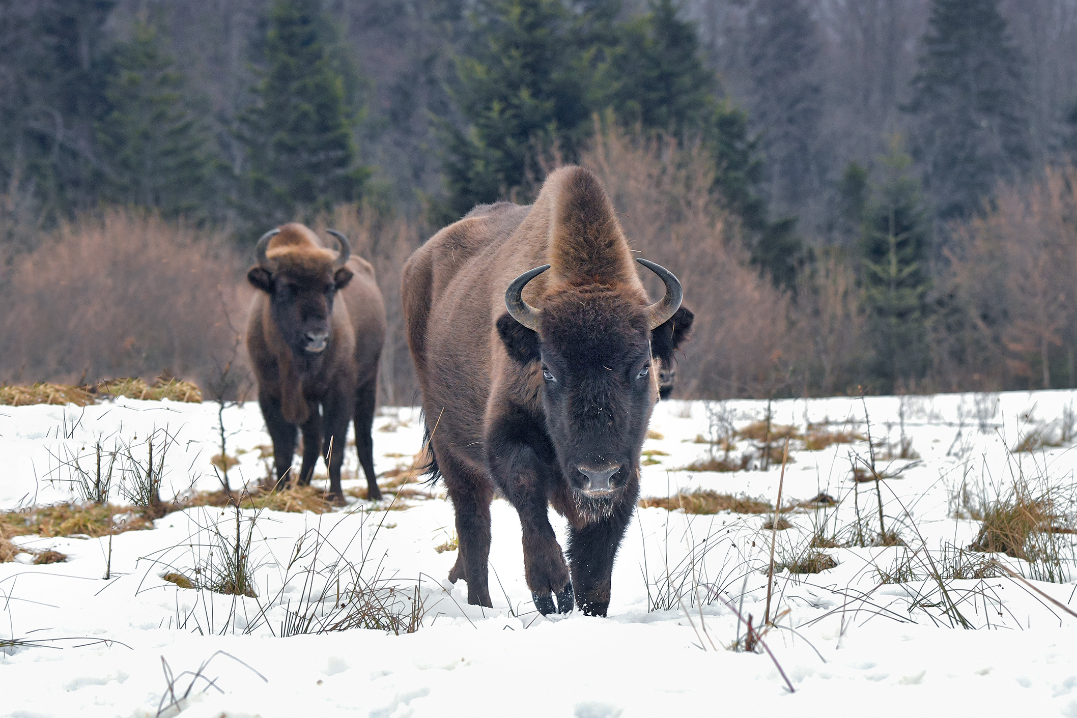 Сколівські Бескиди, Сколівський, Дрогобицький, Турківський р-ни. Зубри були завезені у Сколівські Бескиди у 2006р. у рамках програми "Відновлення популяції зубра європейського в українській частині Східних Карпат". Після вольєрної перетримки тварини успішно випущені в природні умови.